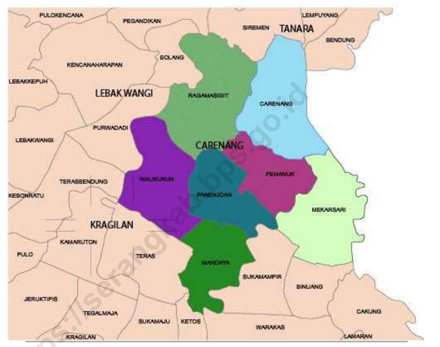 petacarenang